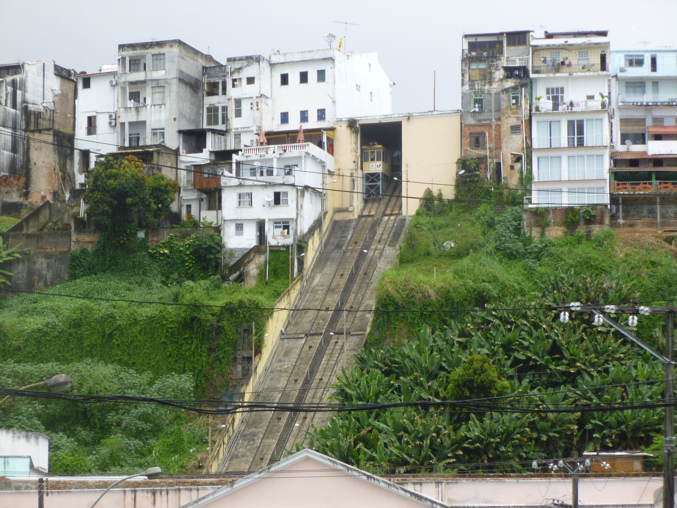 Aufzug Santo Antonio